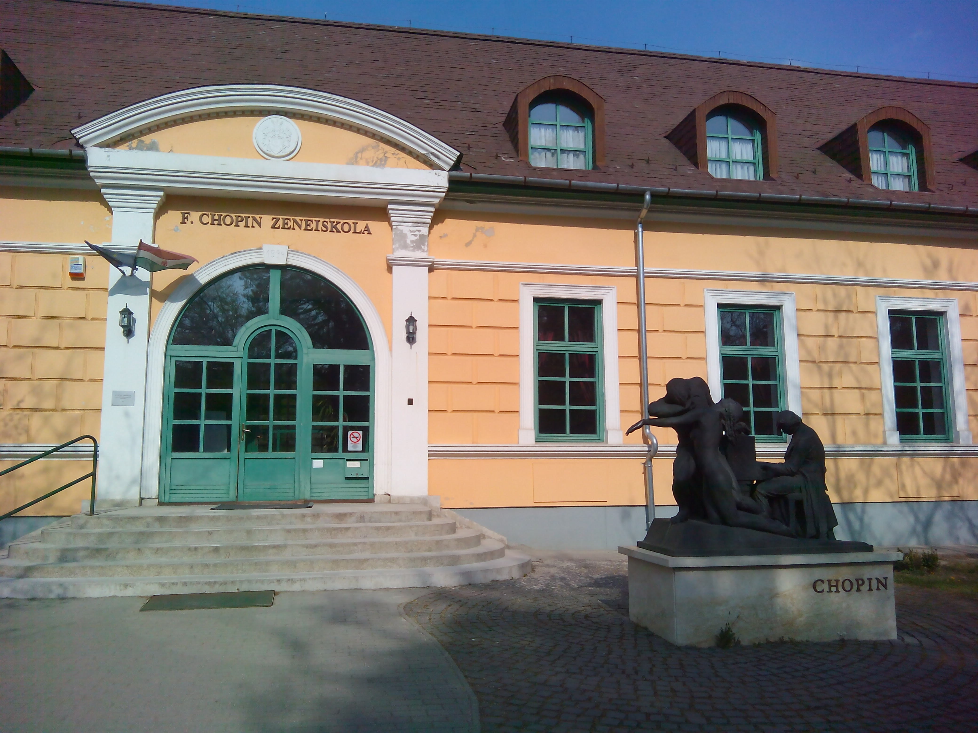 Gödöllő Frédéric Chopin Zeneiskola